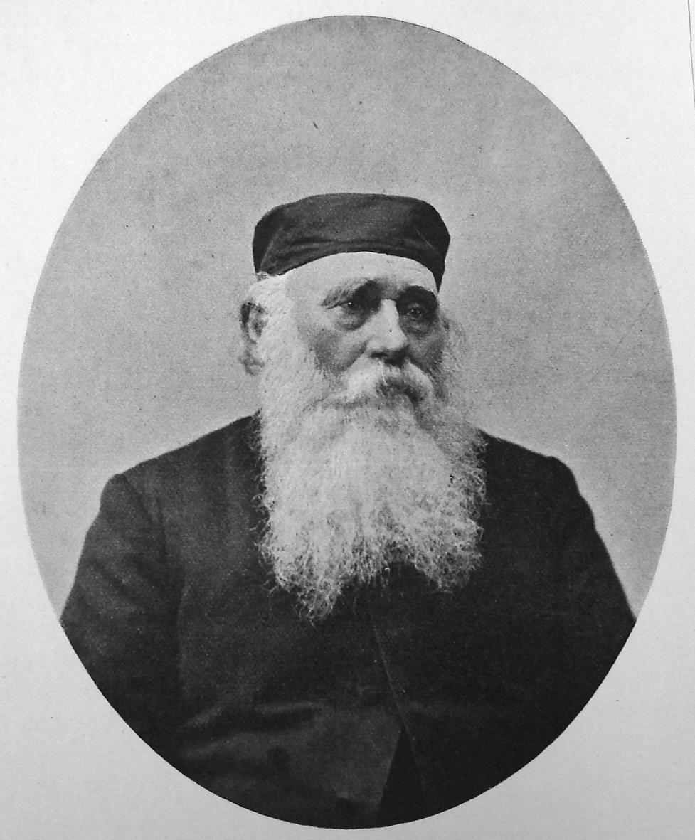 Hans Peter Børresen (29. november 1825 - 23. september 1901) var medstifter af Dansk Santalmission